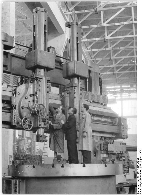 Zentralbild-Junge Blb-Qu 18.8.1954 Karuselldrehschrank zur Leipziger Messe. Der VEB "7.Oktober" Berlin Weißensee wird auf der diesjährigen Leipziger Messe ein Großdrehwerk zeigen. UBz: Kollegen des VEB "7. Oktober" machen die Maschine versandfertig.